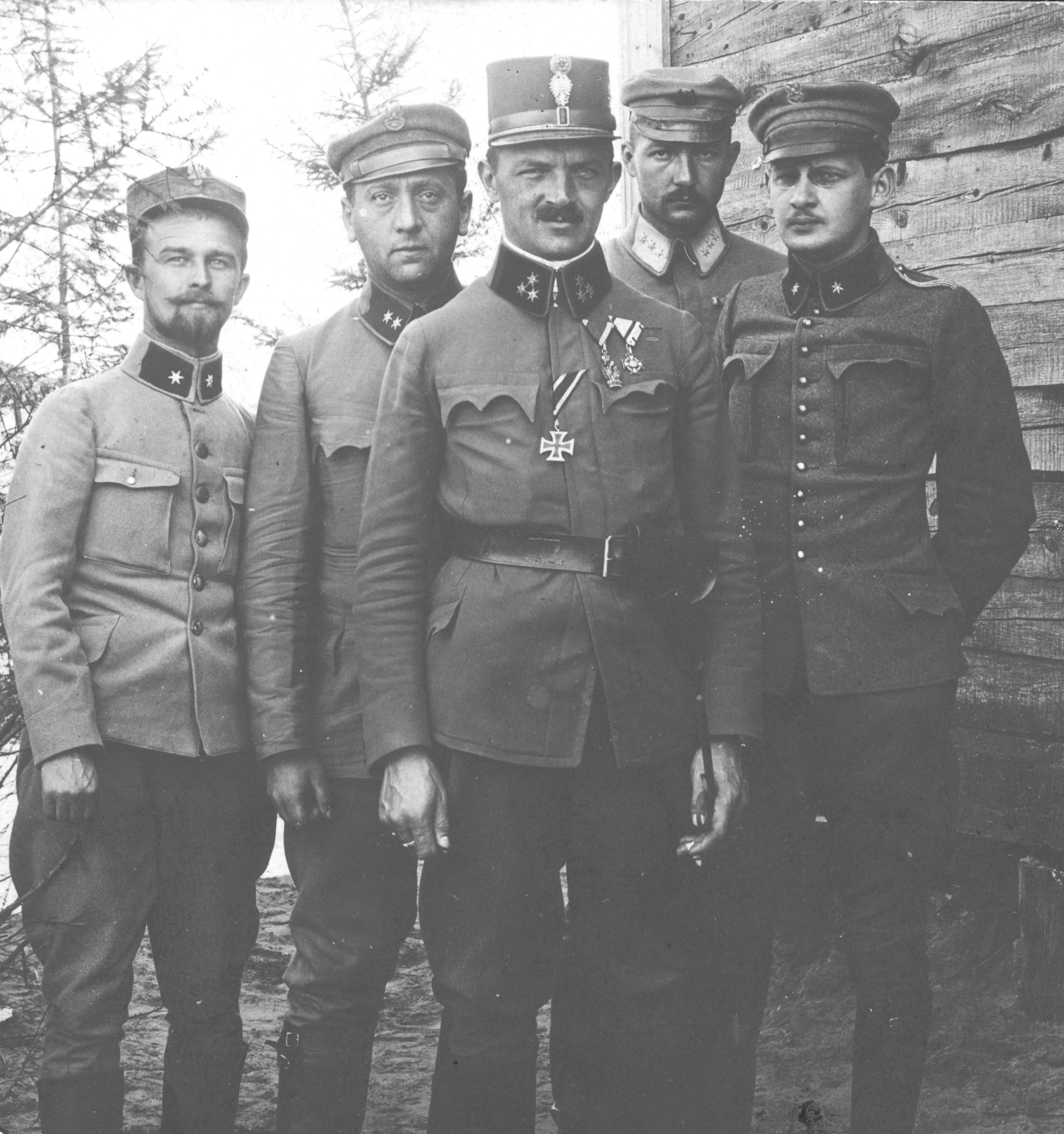 Sztab 2 pułku piechoty Legionów. W środku widoczny kapitan Włodzimierz Zagórski.